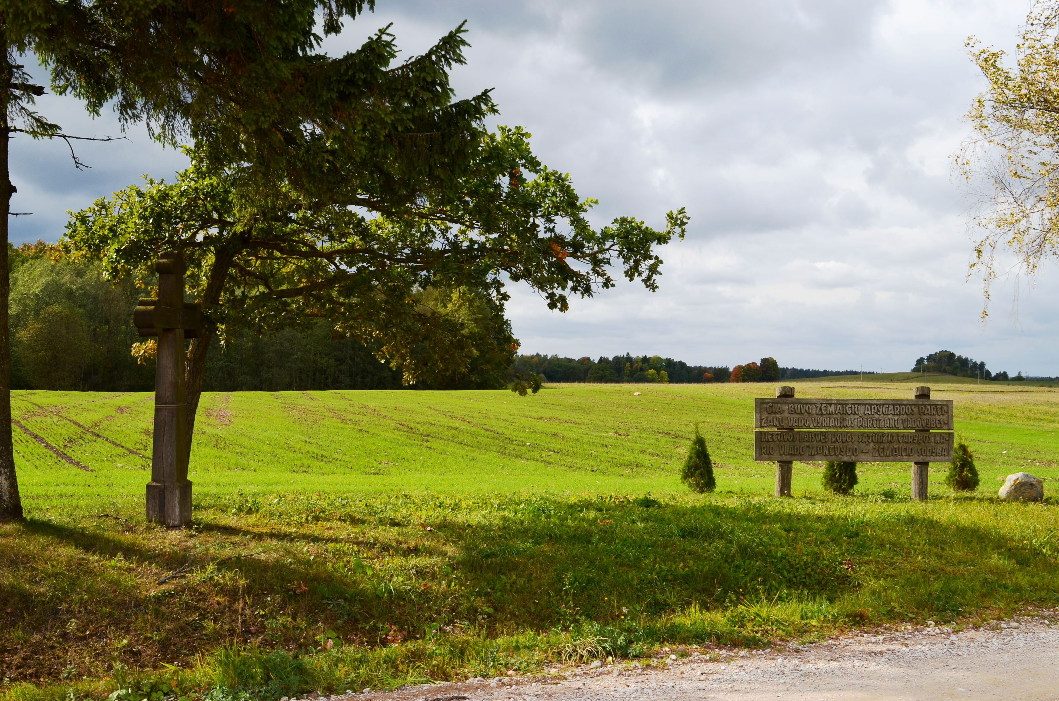 Partizanų vado Vlado Montvydo-Žemaičio sodybvietė, Ñevardėnų k., Telšių raj.